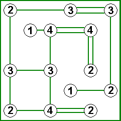 Egen teckning